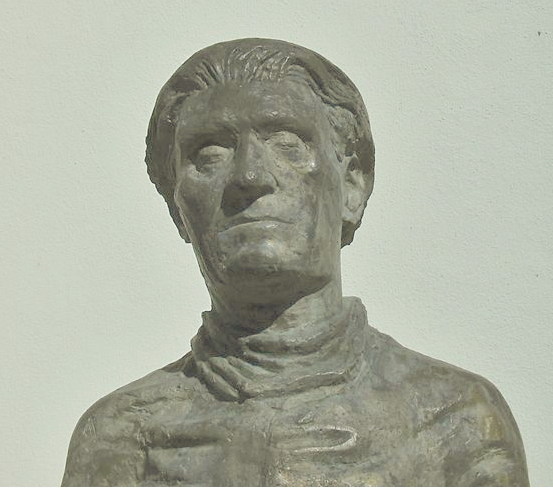 Denkmal (Bronze) von Stefan George in der Fußgängerzone von Bingen